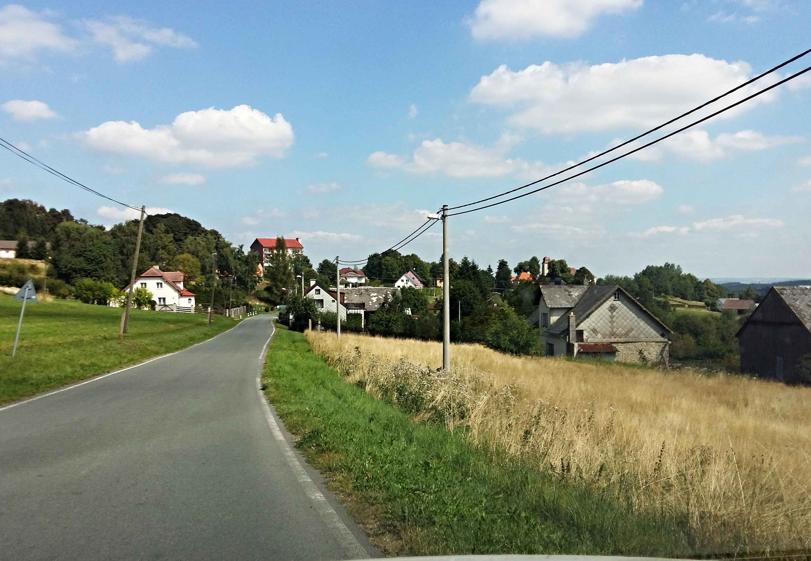 Milíře Celkový pohled z jihu